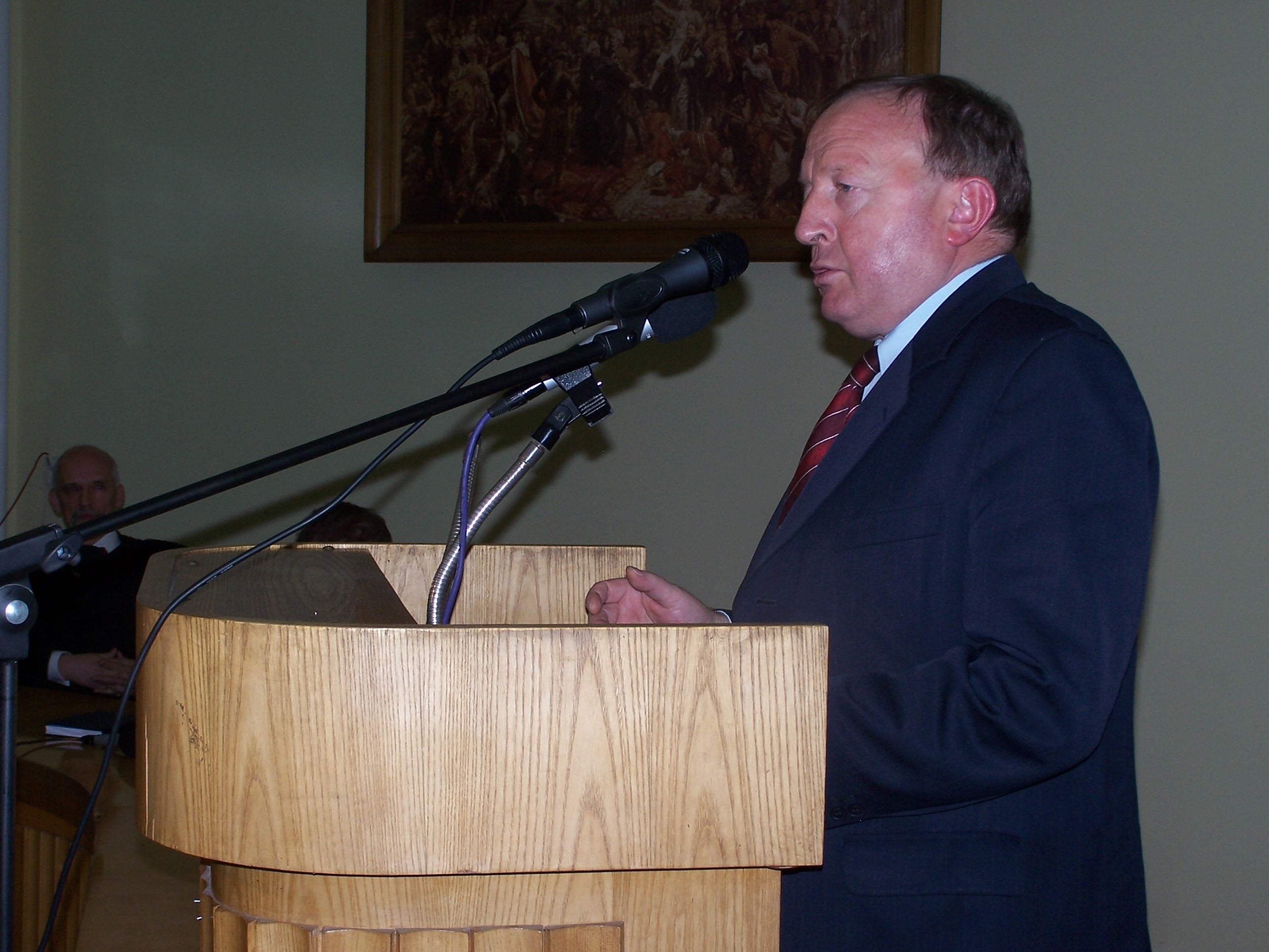 Stanisław Michalkiewicz, Warszawa.